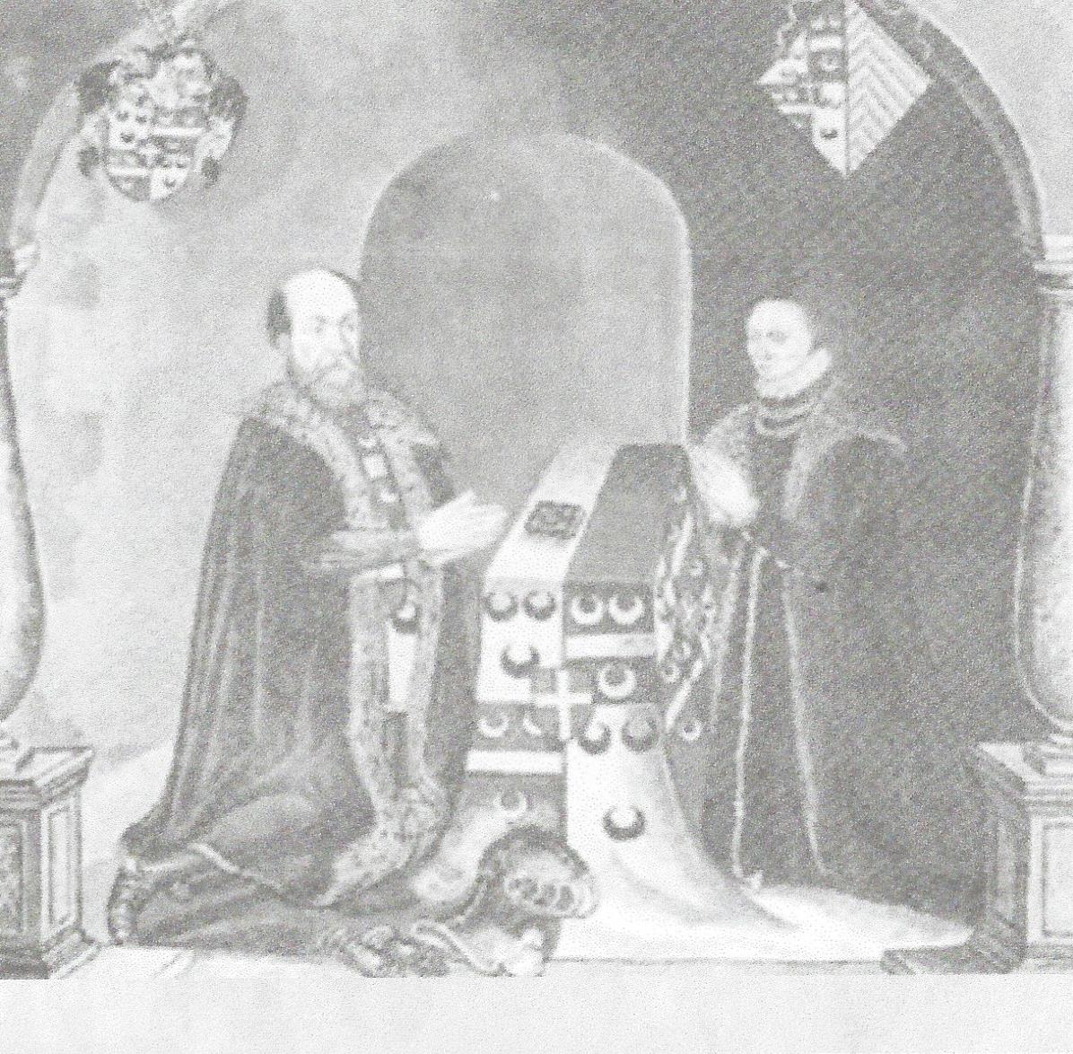 Jacob van Duvevoirde (1525-1607) en Henrica van Egmont-Merenste